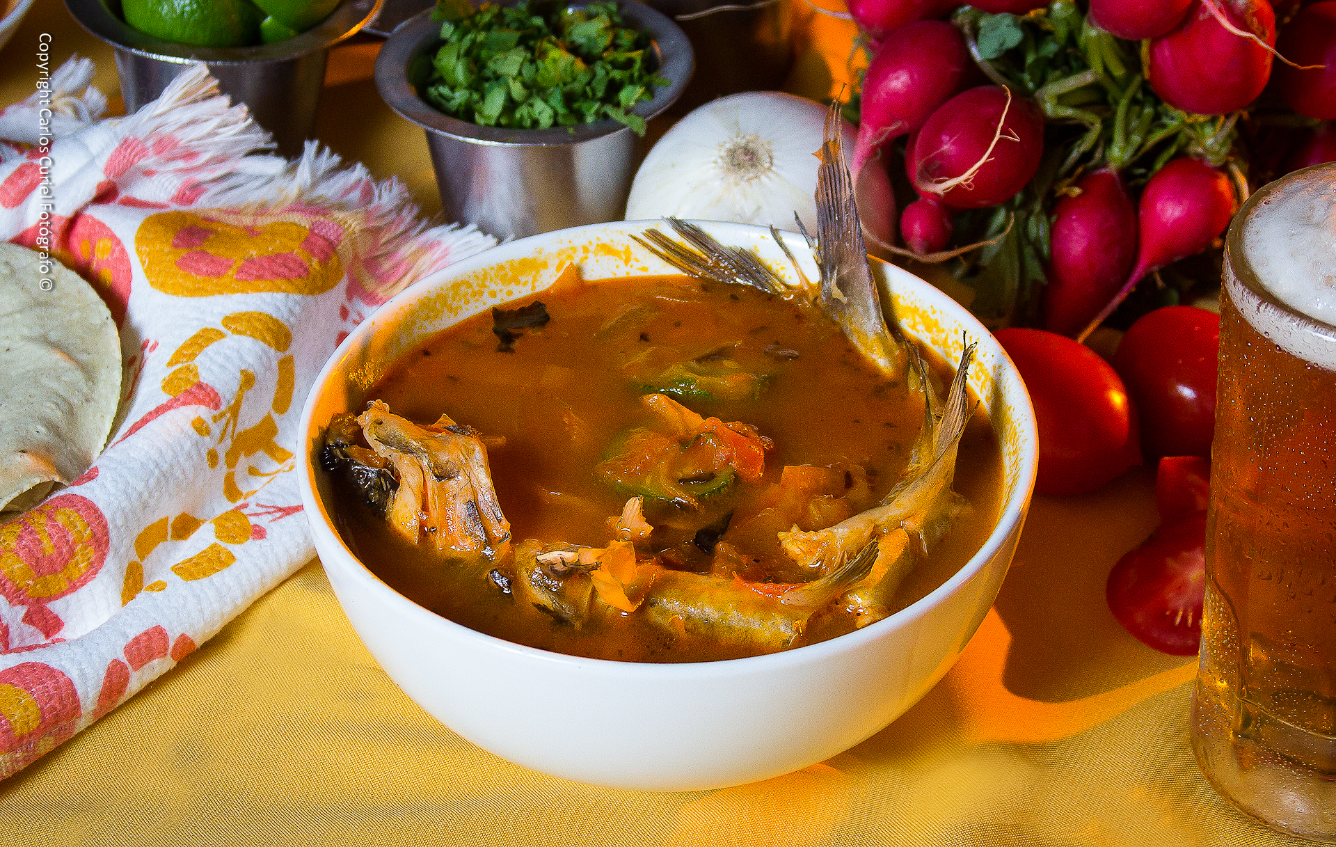 Comida típica de la región, La Barca, Jalisco, México.